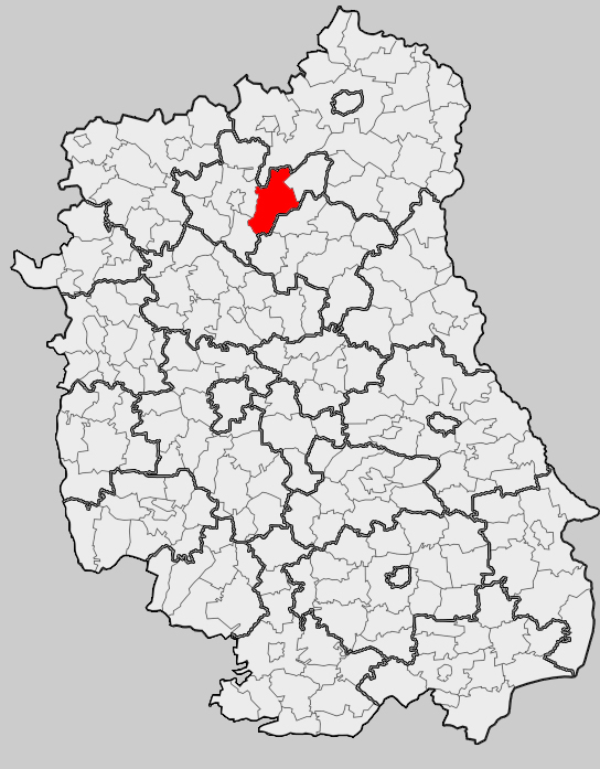 Map of gmina Wohyń, Radzyń Podlaski county, Lublin voivodship Mapa gminy Wohyń, powiat radzyński, województwo lubelskie